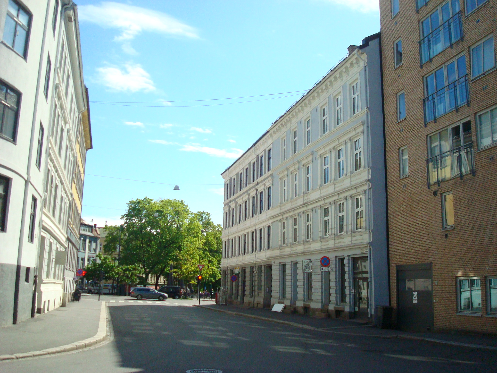 Kingos gate i Oslo